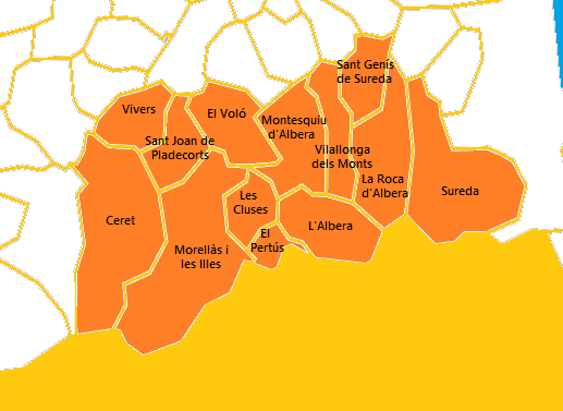 Mapa del Cantó de Vallespir - Albera elaborat a partir d'un mapa de lliure disposició